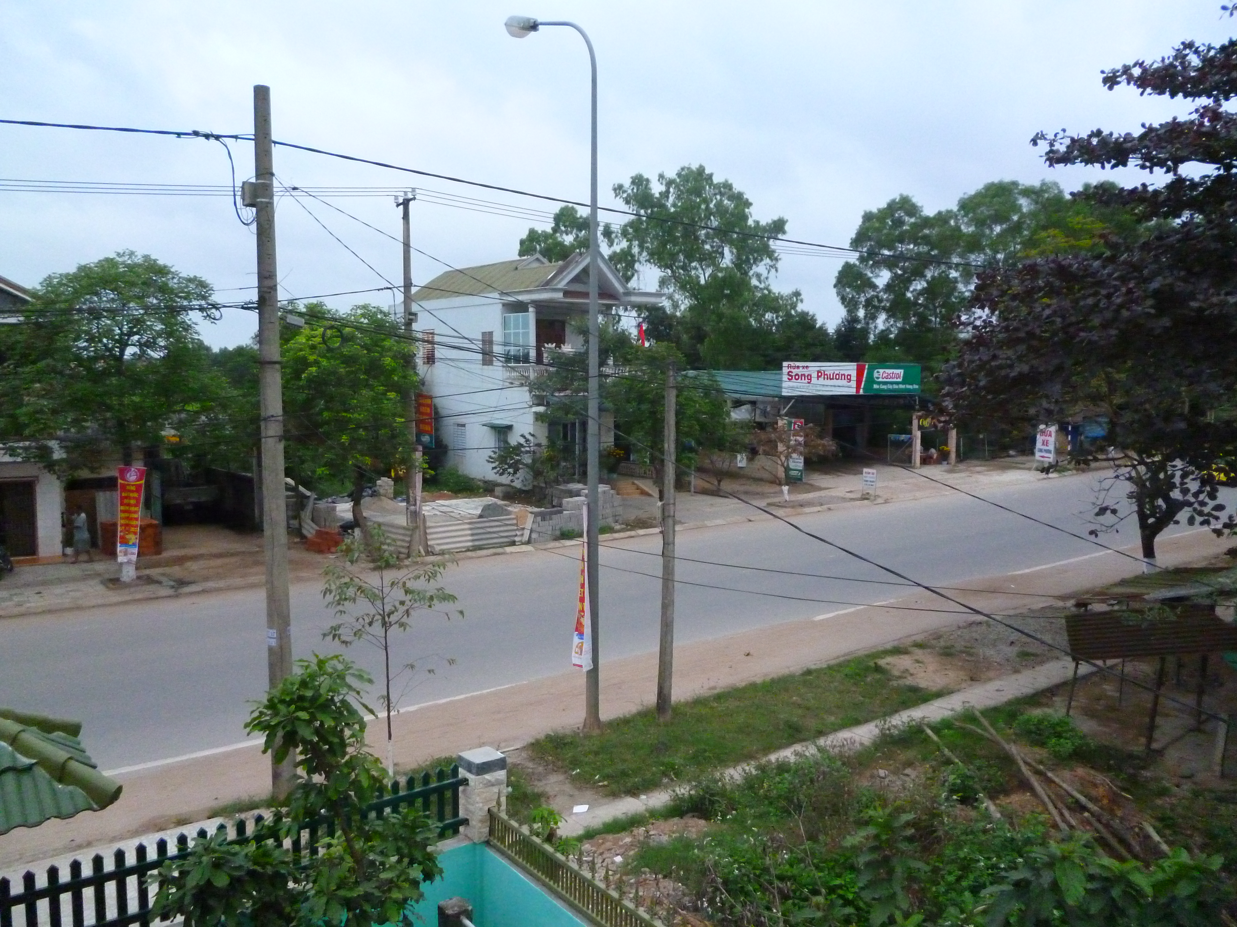 Hình chụp về đuong 9 phường 3 Đông Hà năm 2013